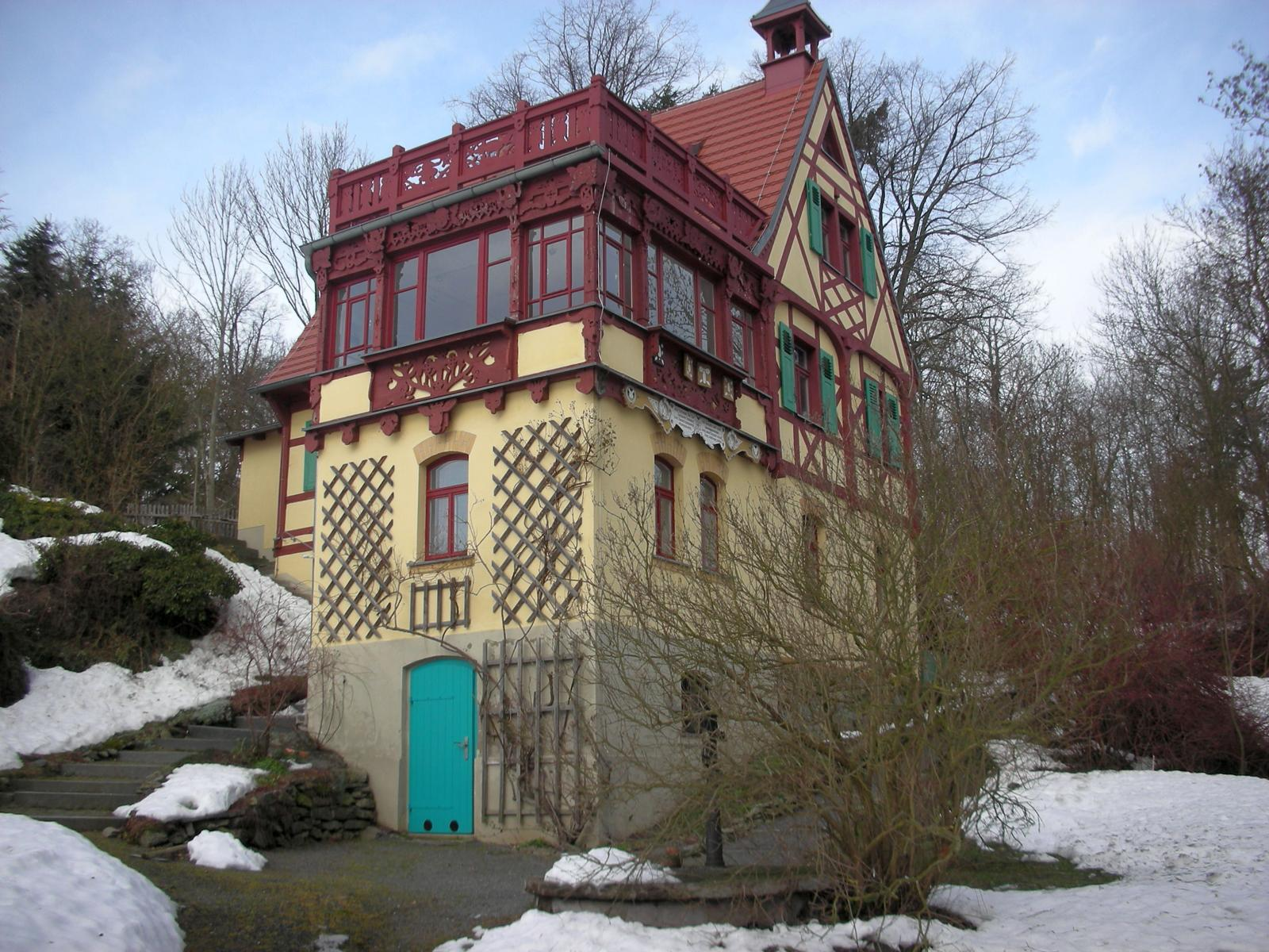 Herrman-Vogel-Haus in Krebes Burgsteinstraße 5